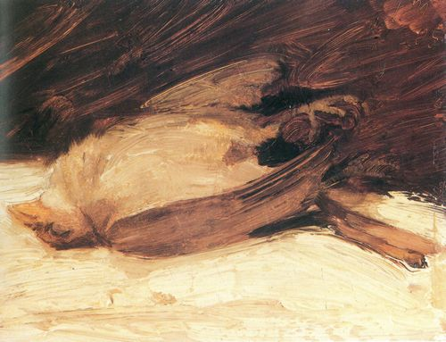 Franz Marc: Der tote Spatz, 1905, Öl auf Holz, 13 x 16.5 cm, Privatbesitz